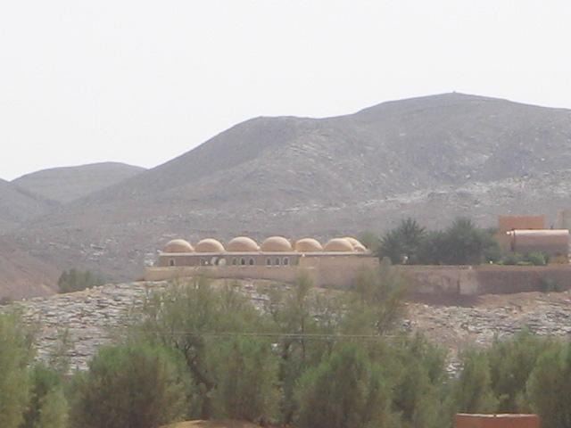 Kerzzaz - Algérie